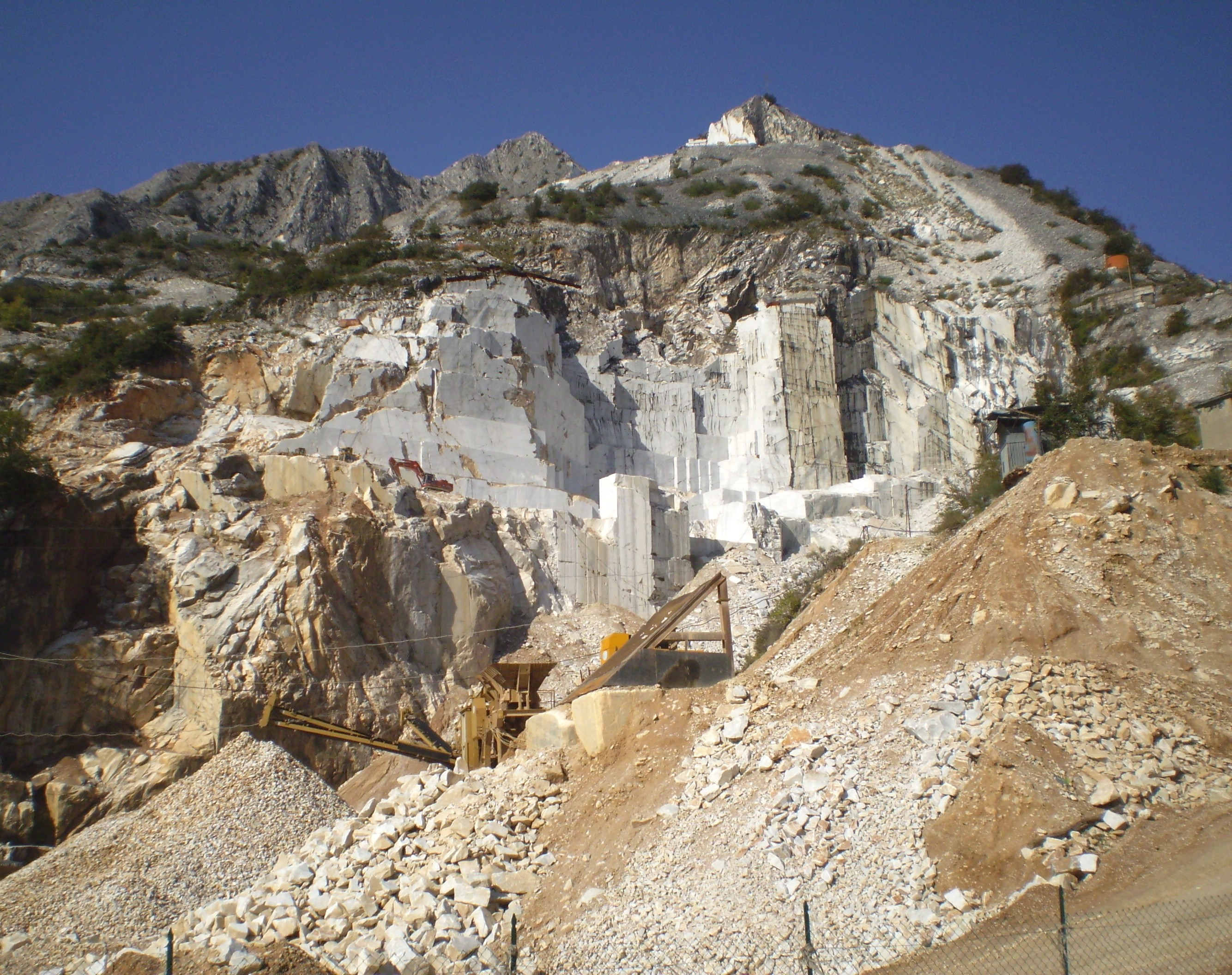 Marble quarry at Carrara, Province Massa-Carrara, Italy. Bacino di Fantiscritti